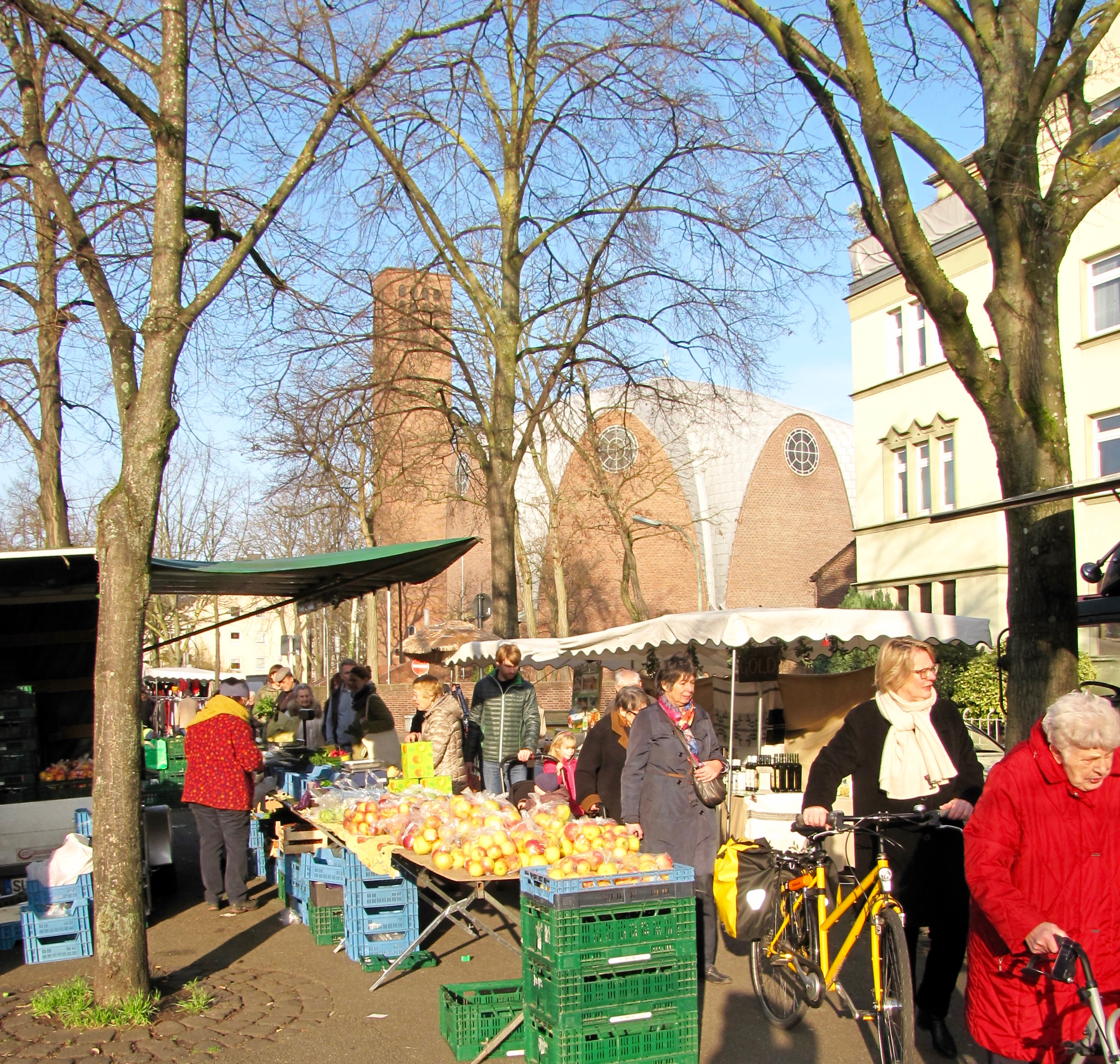 Köln-Riehl: Wochenmarkt (samstags und mittwochs) am Fusse von St. Engelbert auf dem Riehler Gürtel